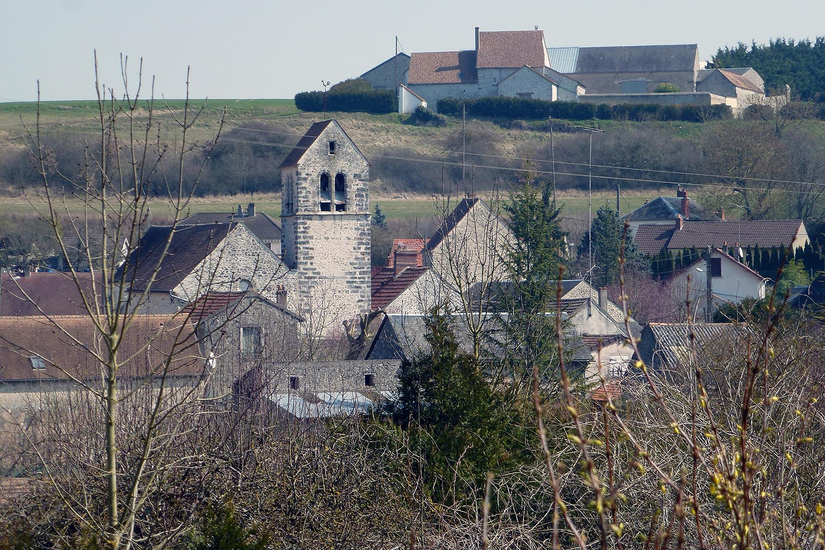 vue sur le village d'Abbeville la Rivière